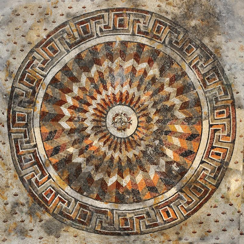 כנסייה מהתקופה הביזנטית ששרידיה נמצאו בשנת 1964 בשכונת "גבעת כצנלסון" בנהריה. שרידי הכנסייה מהמאה השישית כללו רצפת פסיפס הכוללת דמויות אדם ודמויות מעולם החי והצומח ודגמים גאומטריים. פסיפס רוזטה